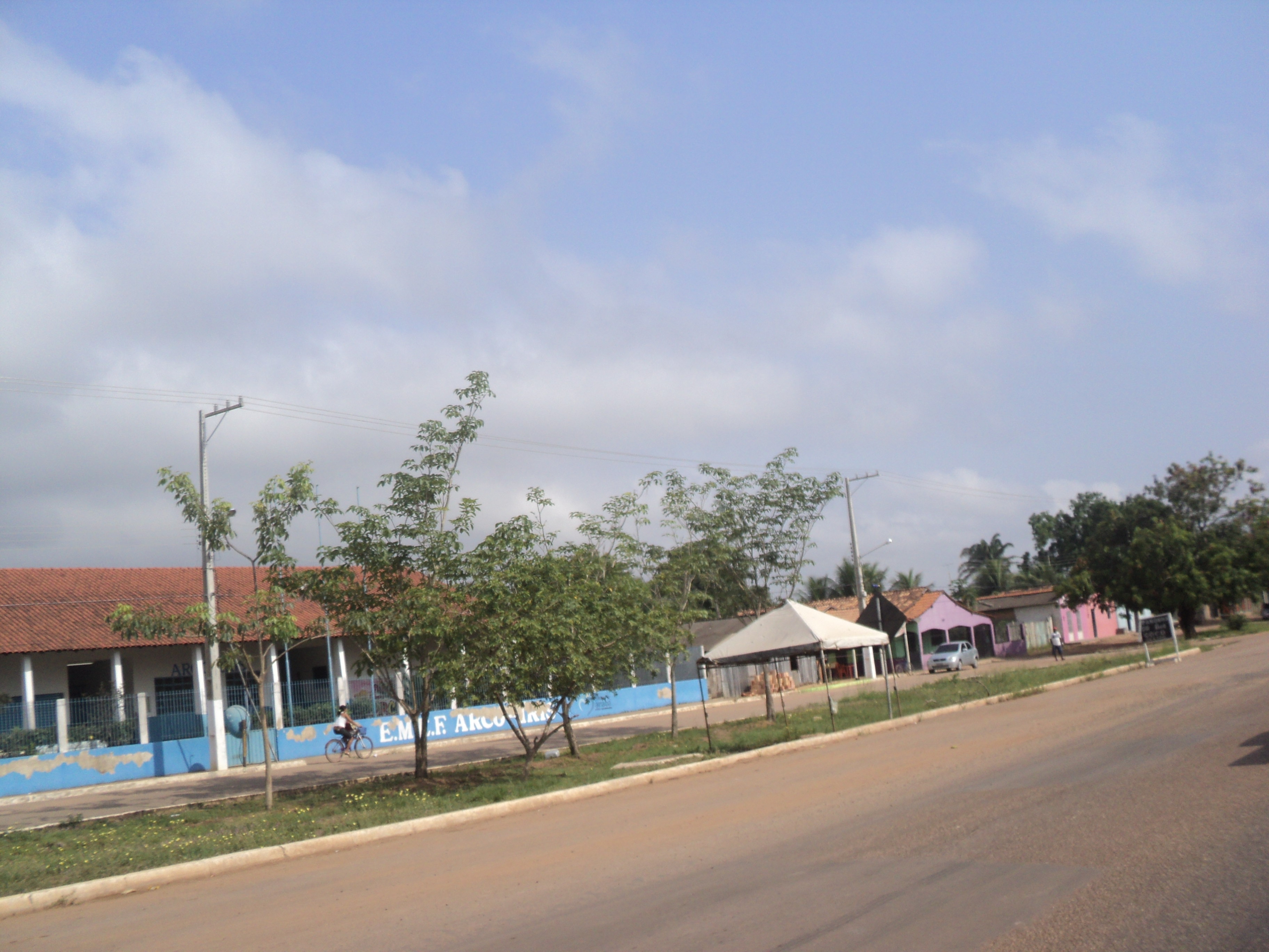 Escola Arco Íris no bairro do Tocantins (Km 11), distrito urbano da Morada Nova.